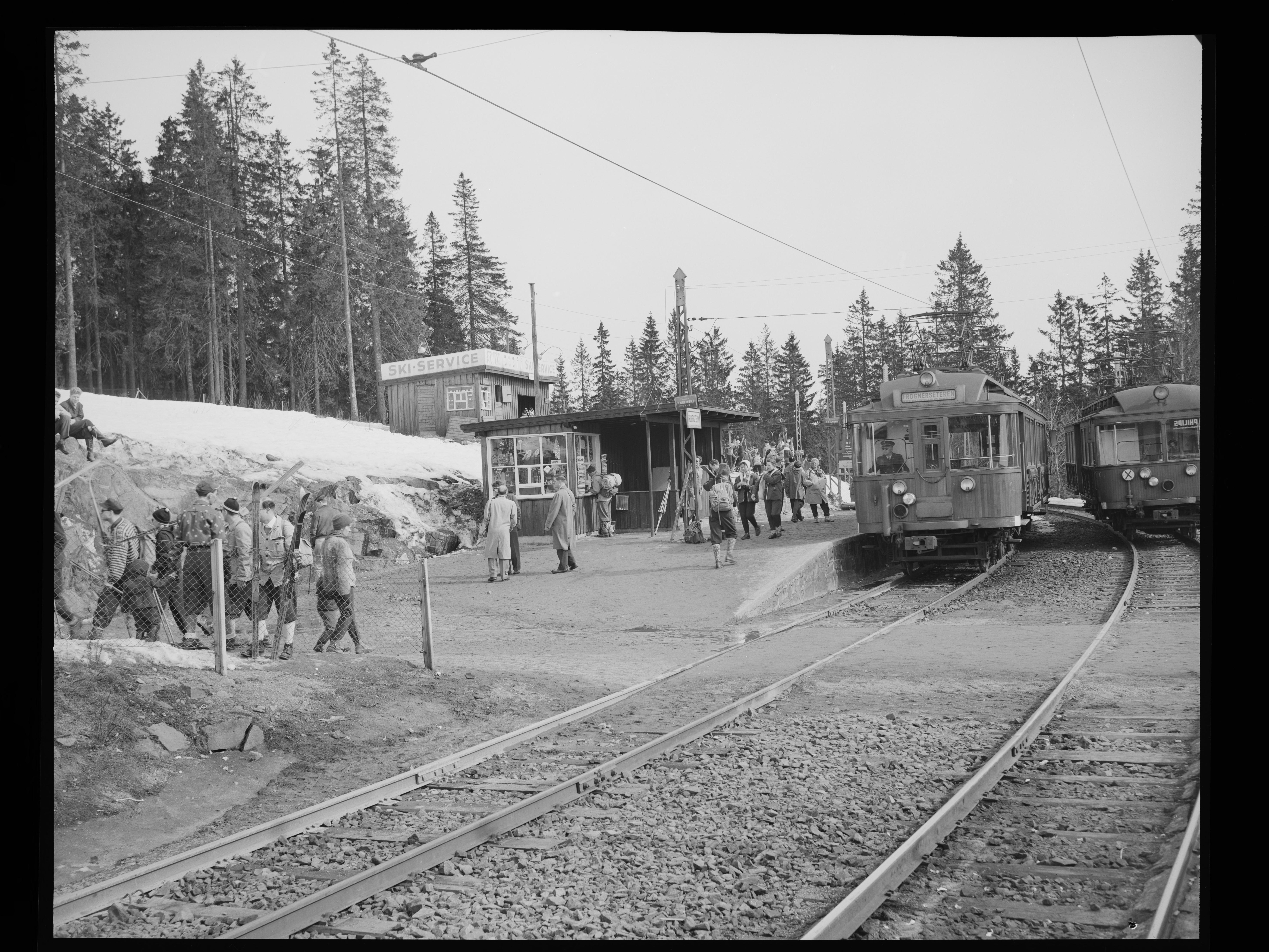 Bildet er hentet fra Nasjonalbibliotekets bildesamling Frognerseteren,Oslo, Oslo, Oslo